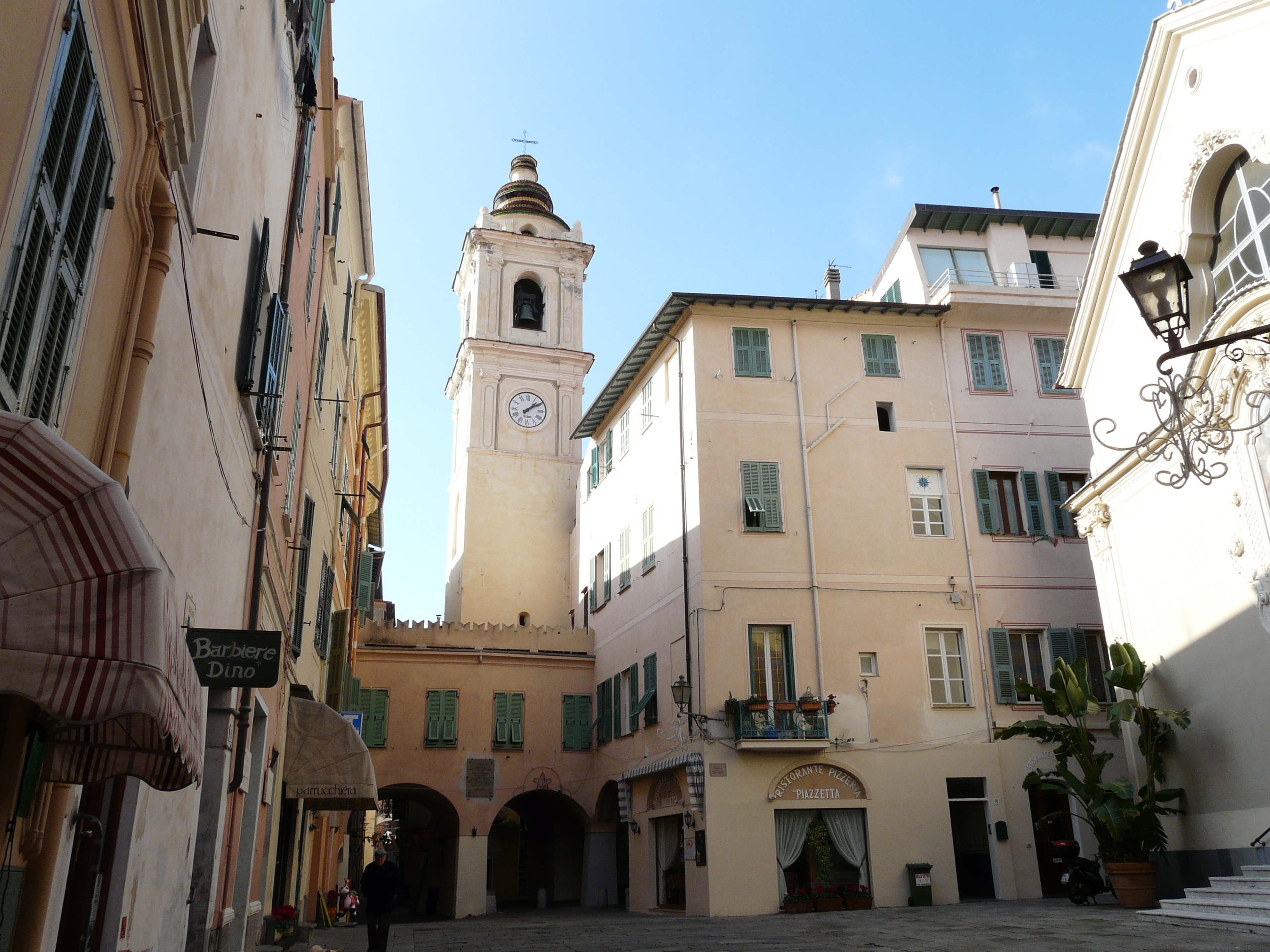 Centro storico di Bordighera, Liguria, Italia